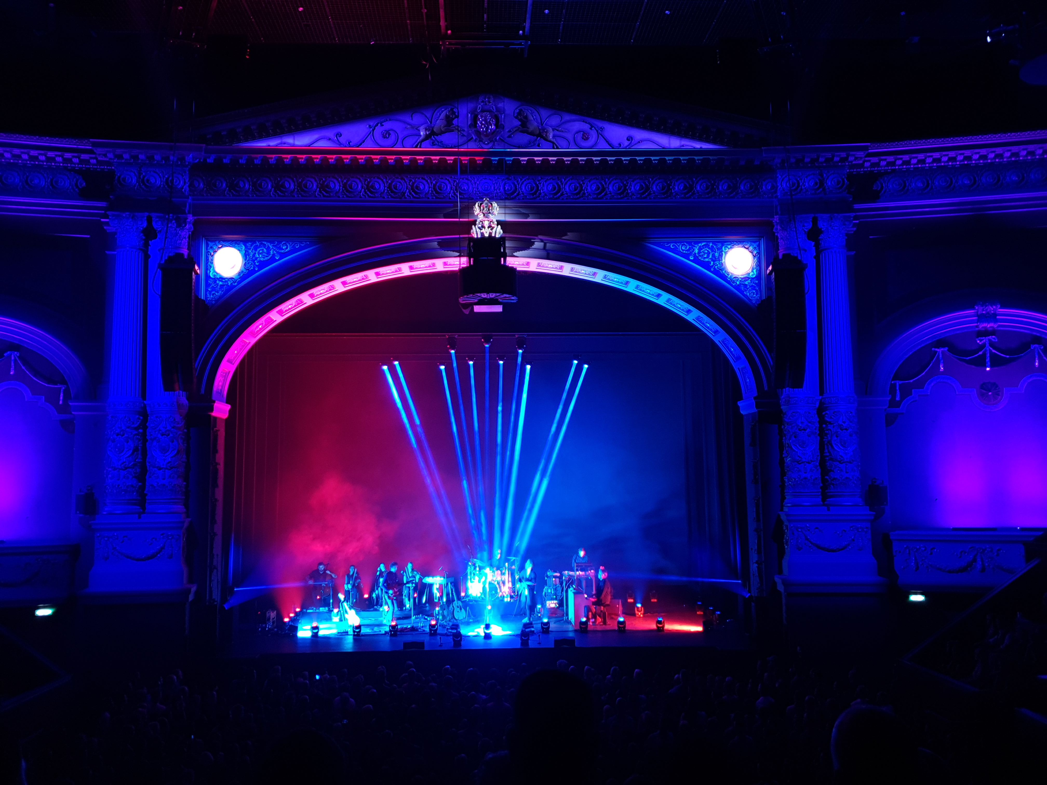 HAEVN at Royal Theatre Carré Amsterdam oct 06 2018